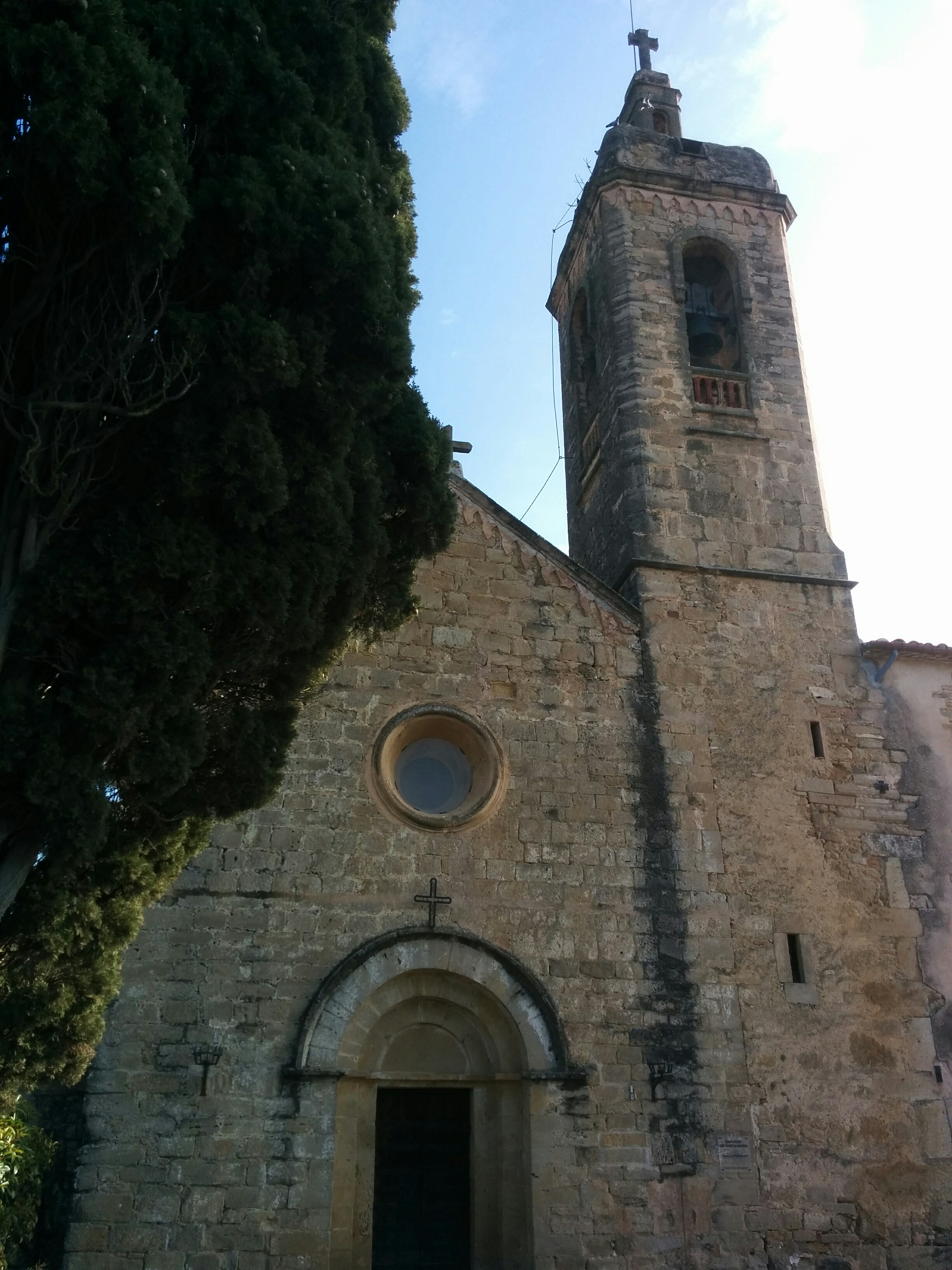 Església parroquial de Santa Maria (Cornellà del Terri)